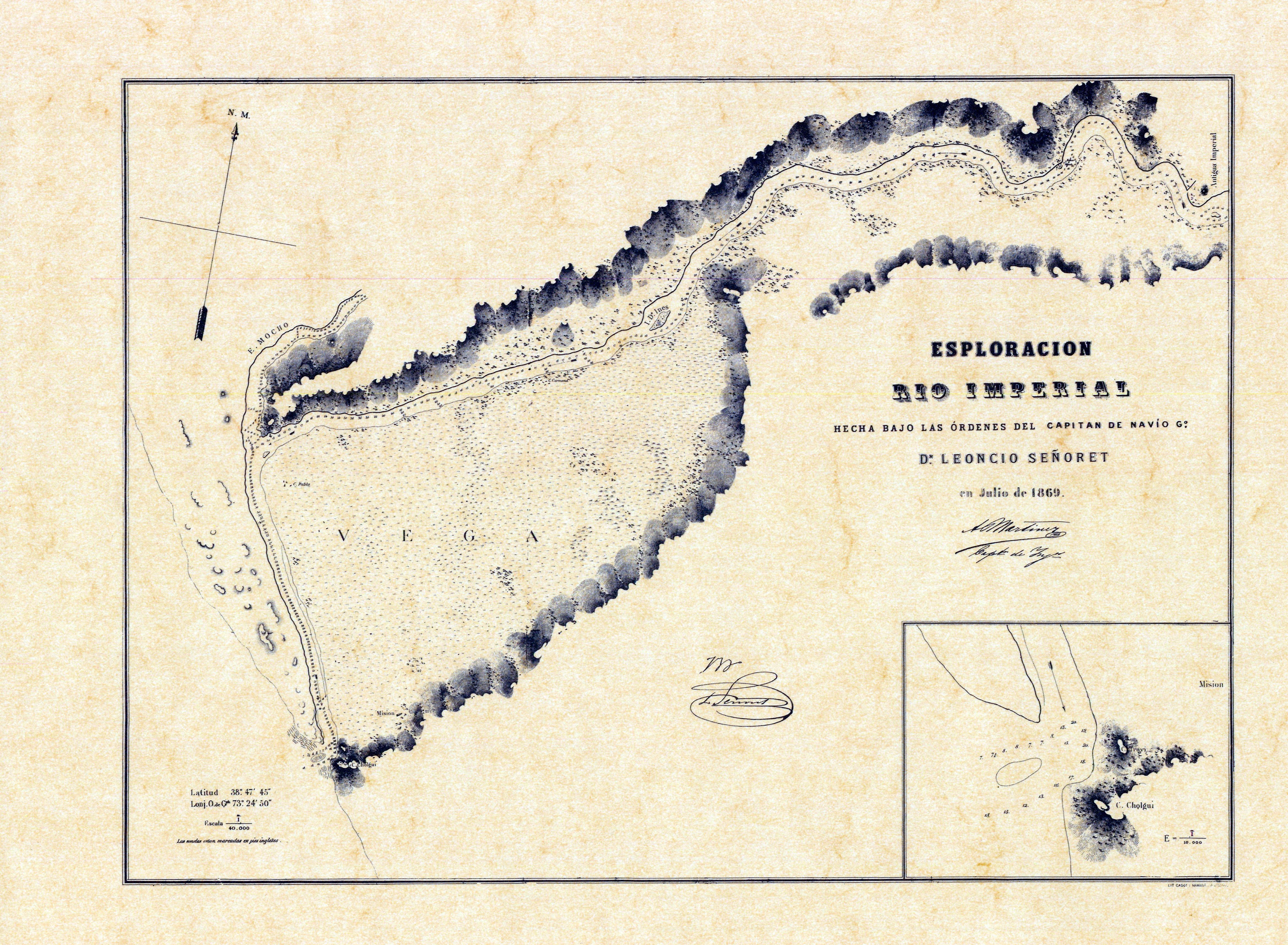 "Exploracion Río Imperial. Hecha bajo las órdenes del Capitan de Navío Go Dn Leoncio Señoret en Julio de 1869". Plano grabado por la Litografía Cadot y Brandt de Santiago, de 53,5 x 70 cm. Contiene un plano pequeño de la caleta Cholqui.